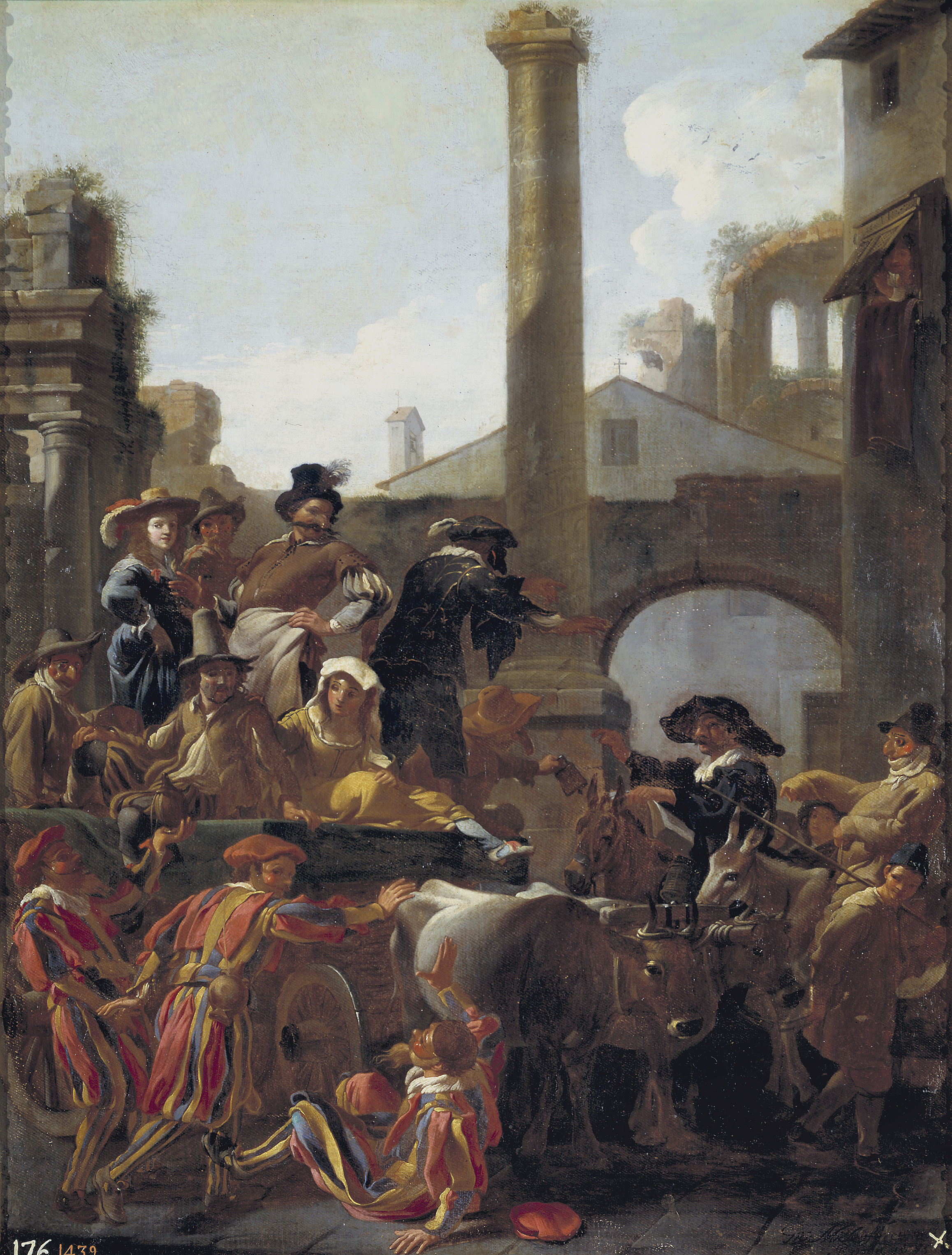 Roman Carnivallabel QS:Len,"Roman Carnival"label QS:Les,"El Carnaval en Roma"